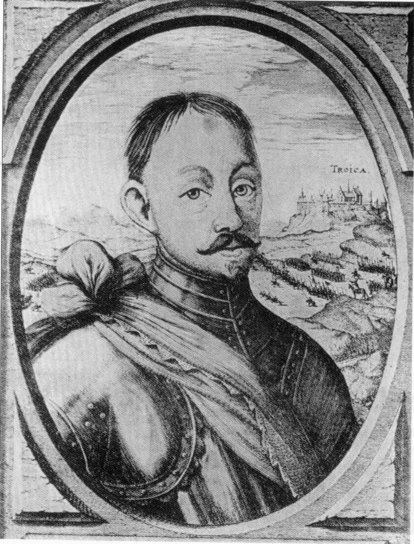 Jan Piotr Sapieha - starosta uświacki